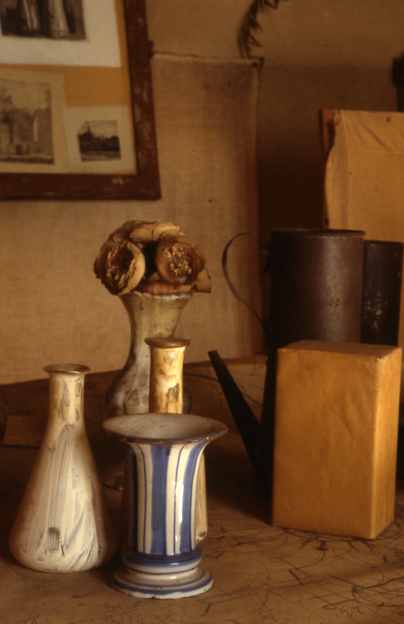 Servizio fotografico : Bologna, 1981 / Paolo Monti. - Foglio: 1, Fotogrammi complessivi: 10/20 : Diapositiva, sviluppo cromogeno/ pellicola ; 35 mm. - ((Sullo chassis della diapositiva n.11 Monti specifica: "Morandi". - Occasione: Documentazione eseguita in collaborazione con Nino Castagnoli per l'Assessorato cultura di Bologna in occasione della mostra Morandi in USA (luoghi appenninici e studio del pittore). - Fonte: Agenda di Paolo Monti: Diapositive 24x36mm (1948-1982), presso Archivio Paolo Monti. - Fonte: Fattura di Paolo Monti: IV. Commesse/ Fattura n. 36 (1981/10/22), presso Archivio Paolo Monti